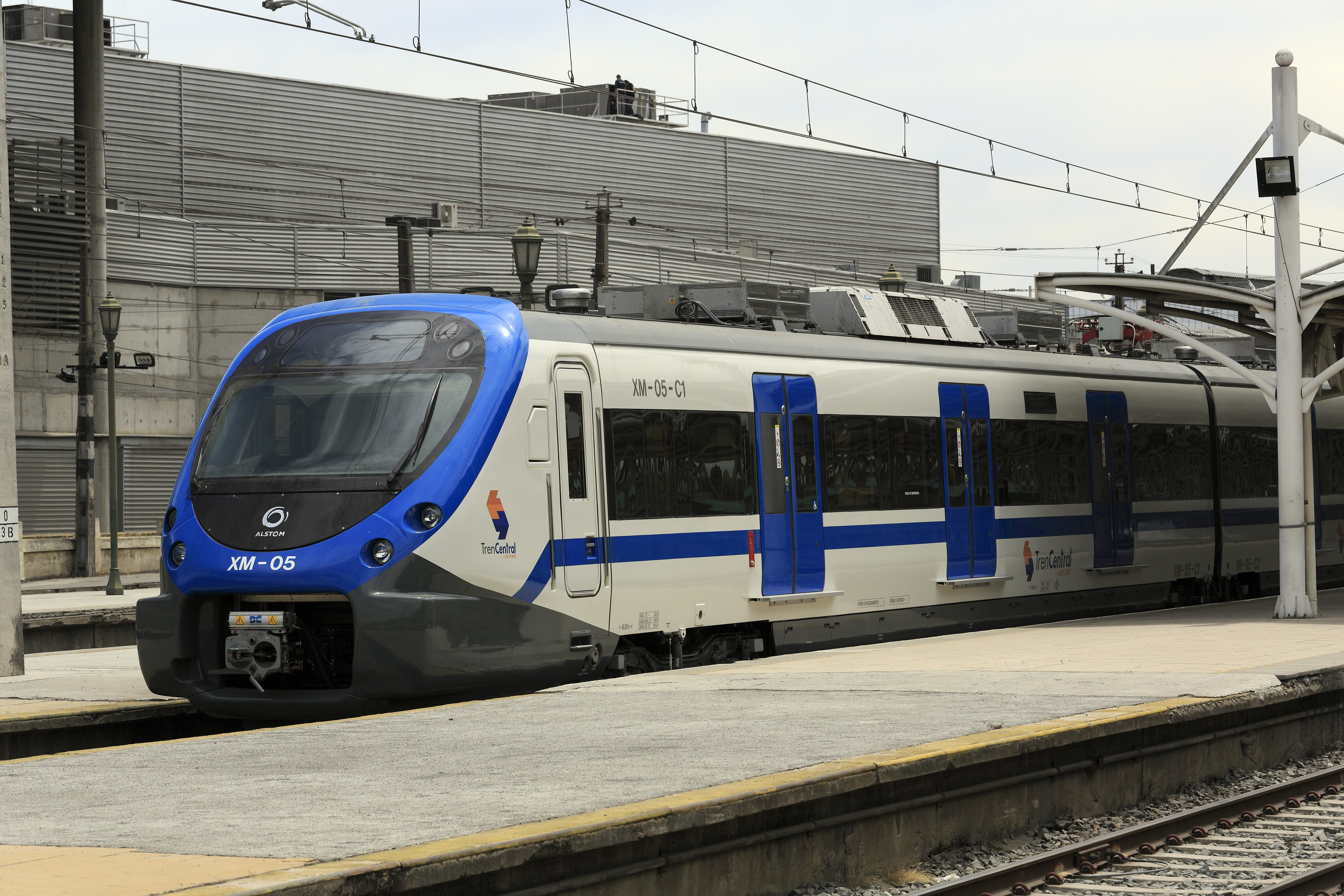 Bahnsteiggleis 4, der Triebwagen ist der erste von vier auf diesem Gleis abgestellten des Typs X’Trapolis Modular. Die S-Bahn-Verbindung nach Nos ist noch im Bau, sie soll noch im Aufnahmejahr eröffnet werden. Bisher fahren die Wagen nur probeweise und ohne Reisende.